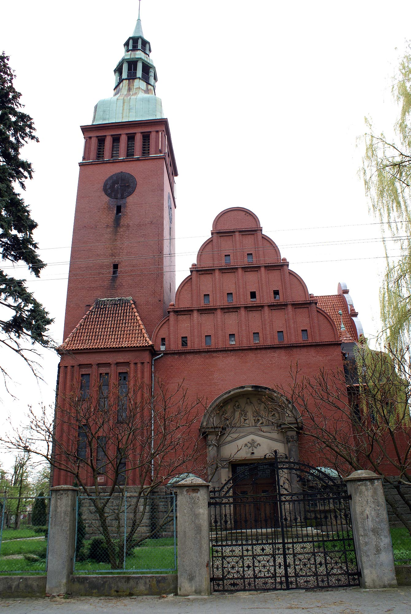 Prusice, miasto